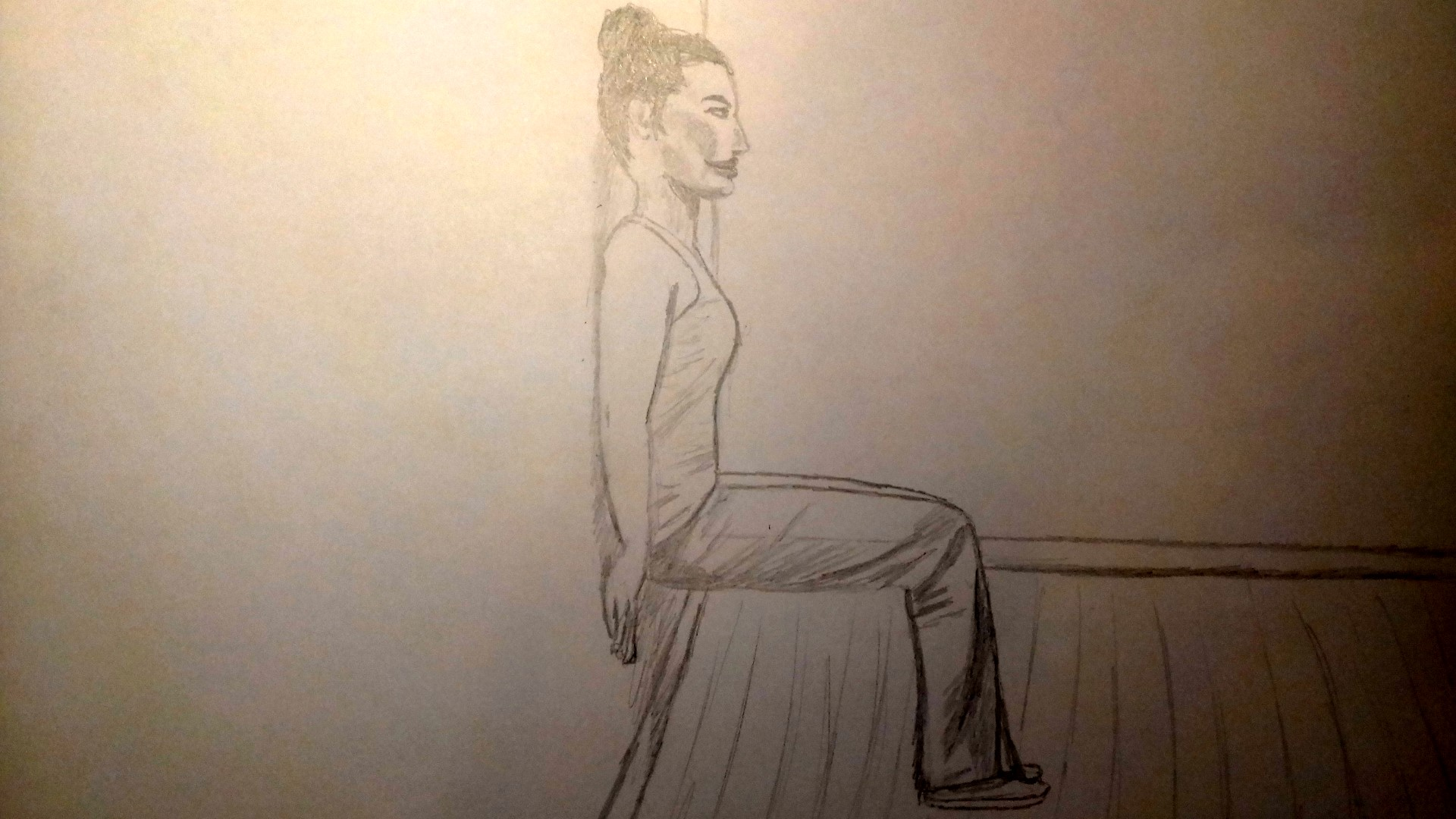 siège